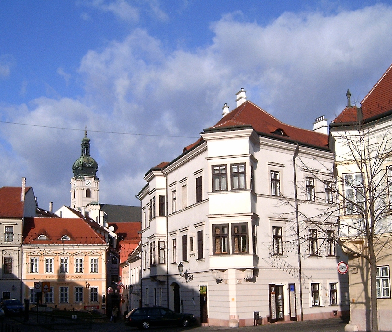 A Bécsi kapu tér Győrben (Győr-Moson-Sopron megye)